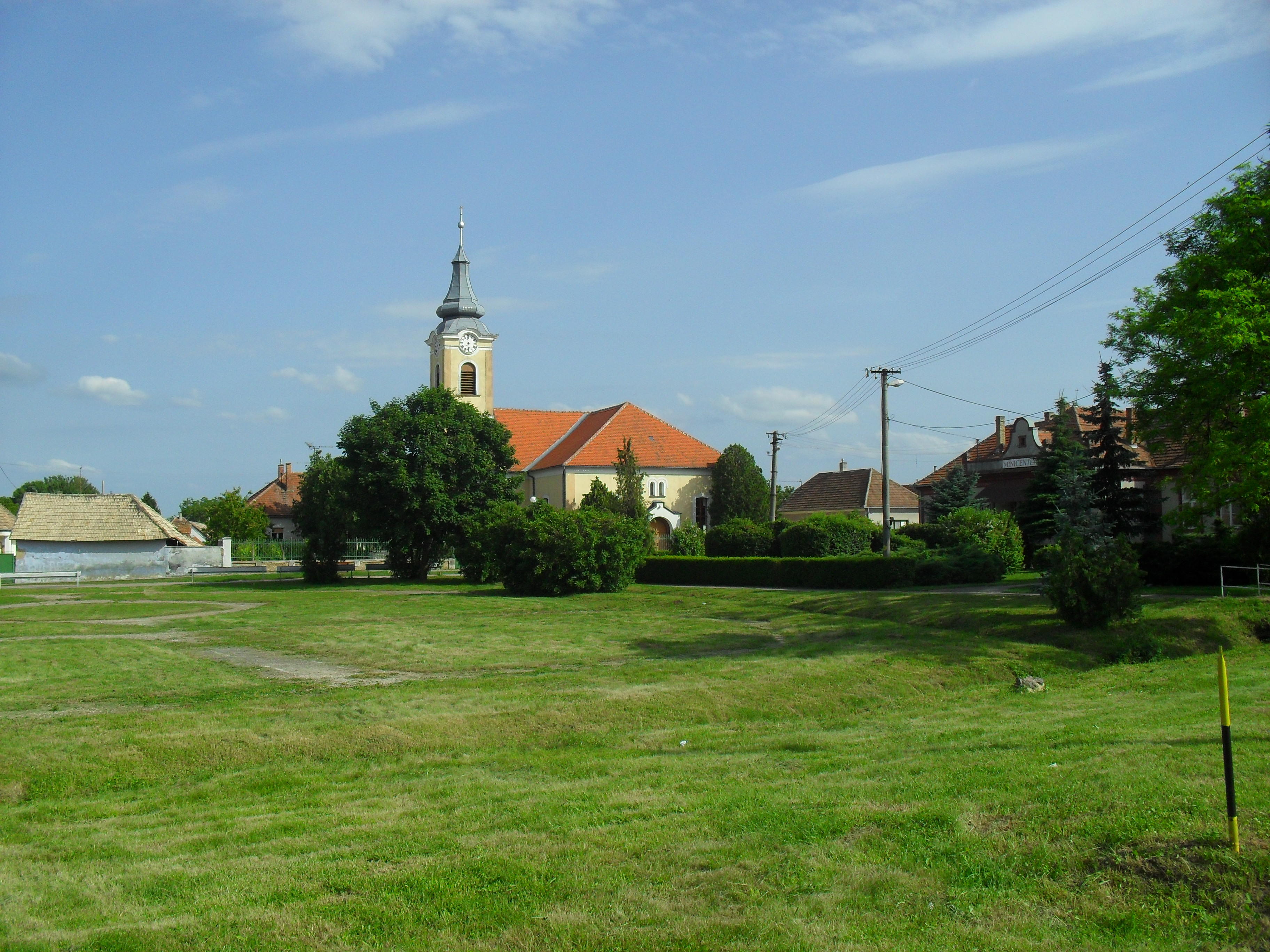 Perbete